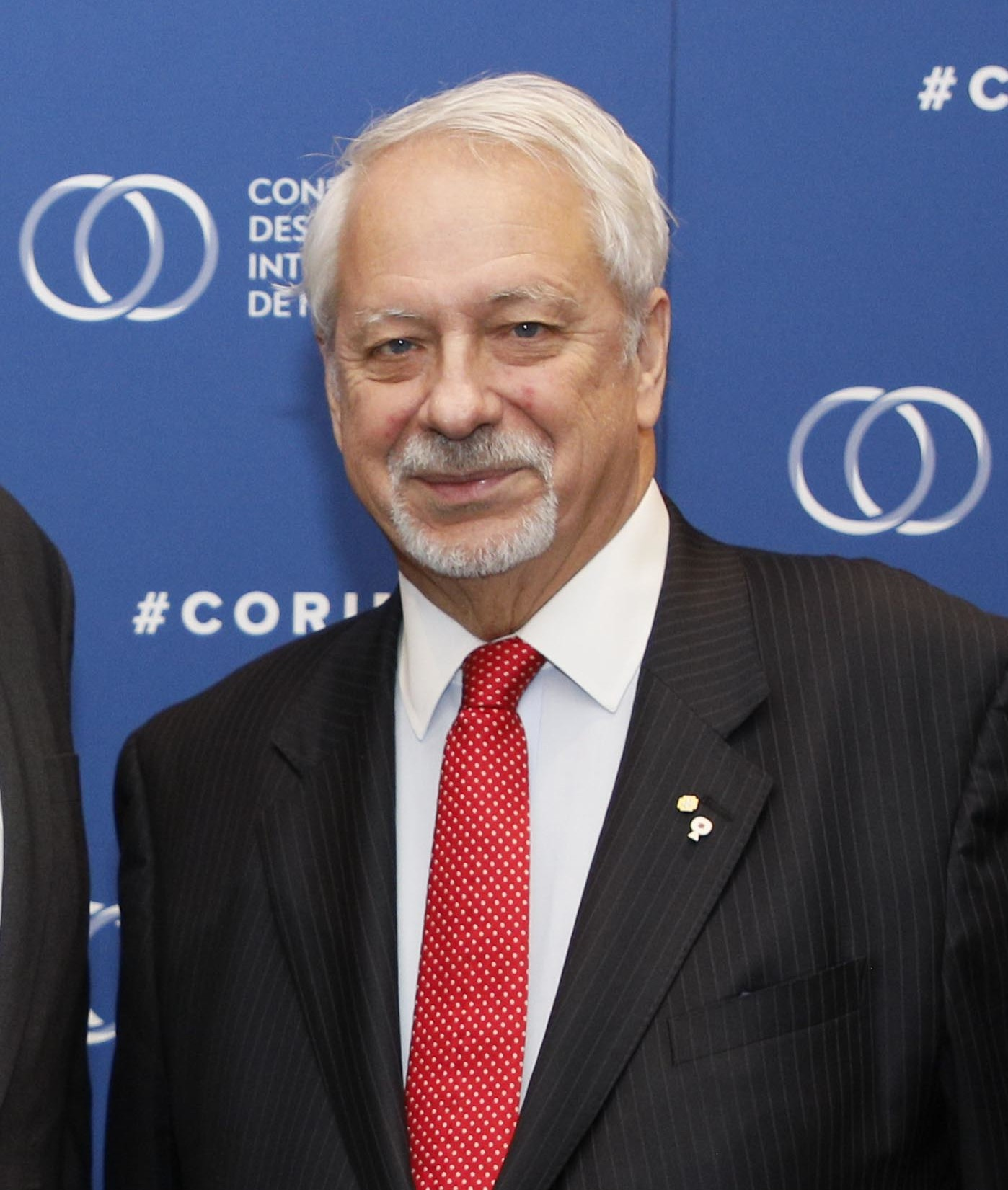 Canada should be a country where no ambition is too big and where no dream is out of reach. We should be a principled force for peace and freedom on the world stage, a disciplined protector of tax dollars here at home, a welcoming land of refuge for the world’s persecuted and afflicted, a proud champion for clean Canadian technology, and a model of clear roles and responsibilities between levels of government. I was proud to share my vision to build a stronger Canada in a turbulent world. Stay tuned for more speeches about My Vision for Canada in the coming weeks. Le Canada doit être un pays où aucune ambition n’est trop grande et aucun rêve hors de portée. Nous devons être une force de principe pour la paix et la liberté sur la scène mondiale, un protecteur discipliné de l’argent des contribuables au pays, une terre d’accueil pour ceux qui sont persécutés et qui cherchent refuge, un champion des technologies propres canadiennes, et un modèle en terme de rôles et de responsabilités des différents niveaux de gouvernement. J’étais fier de partager ma vision sur comment bâtir un Canada plus fort dans un monde turbulent. Restez à l’écoute pour d’autres discours sur Ma vision du Canada dans les prochaines semaines.